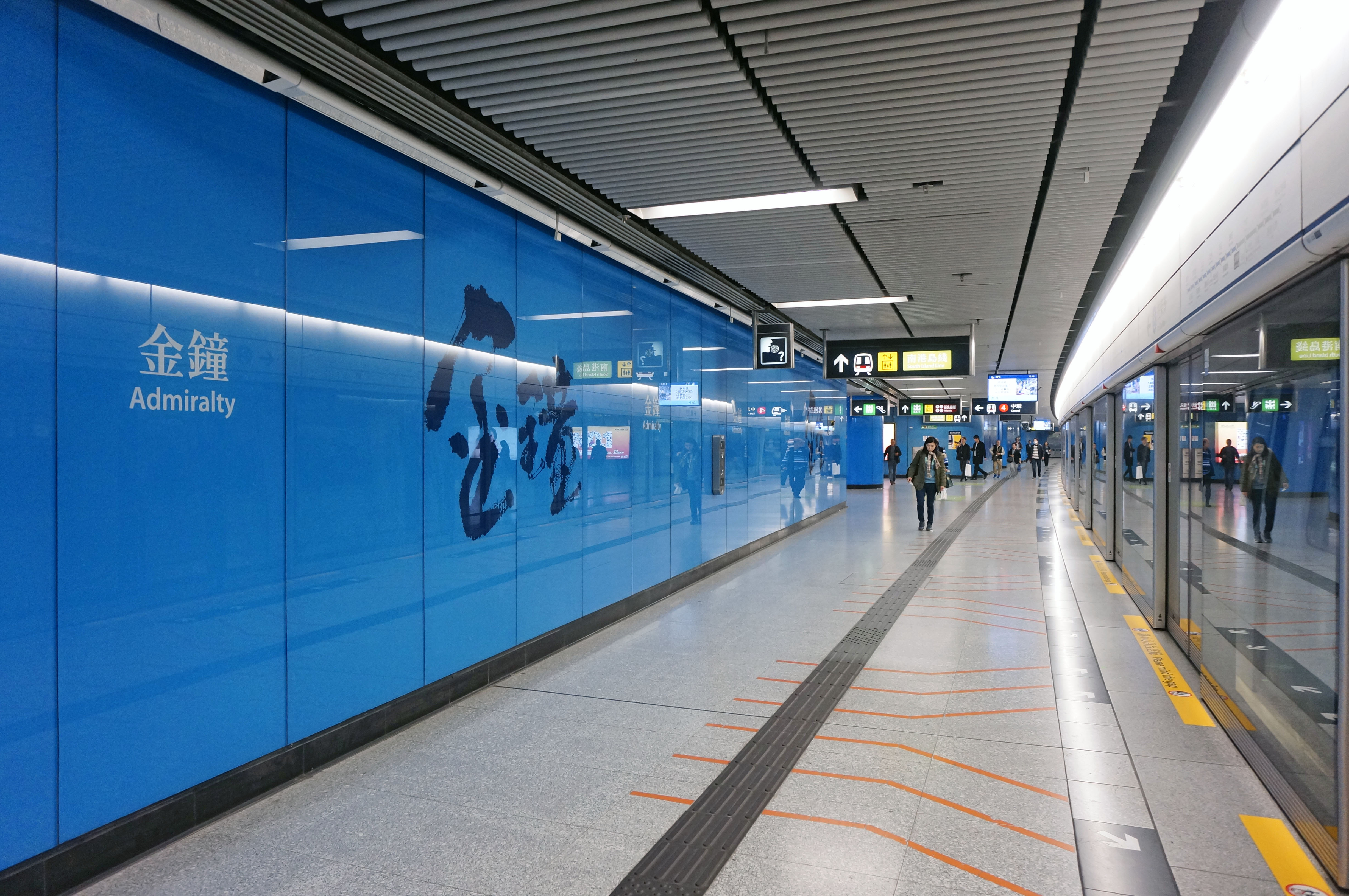 港鐵金鐘站月台